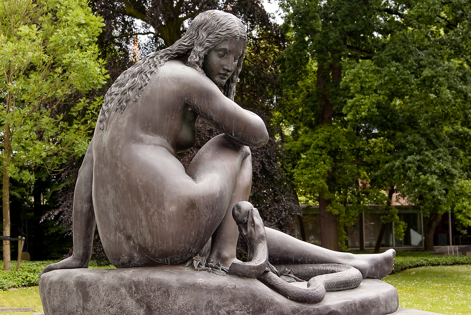 Johannes Antonius van der Ven, Eva in bekoring, 1987 Johannes Antonius van der Ven Eva in bekoring, 1987